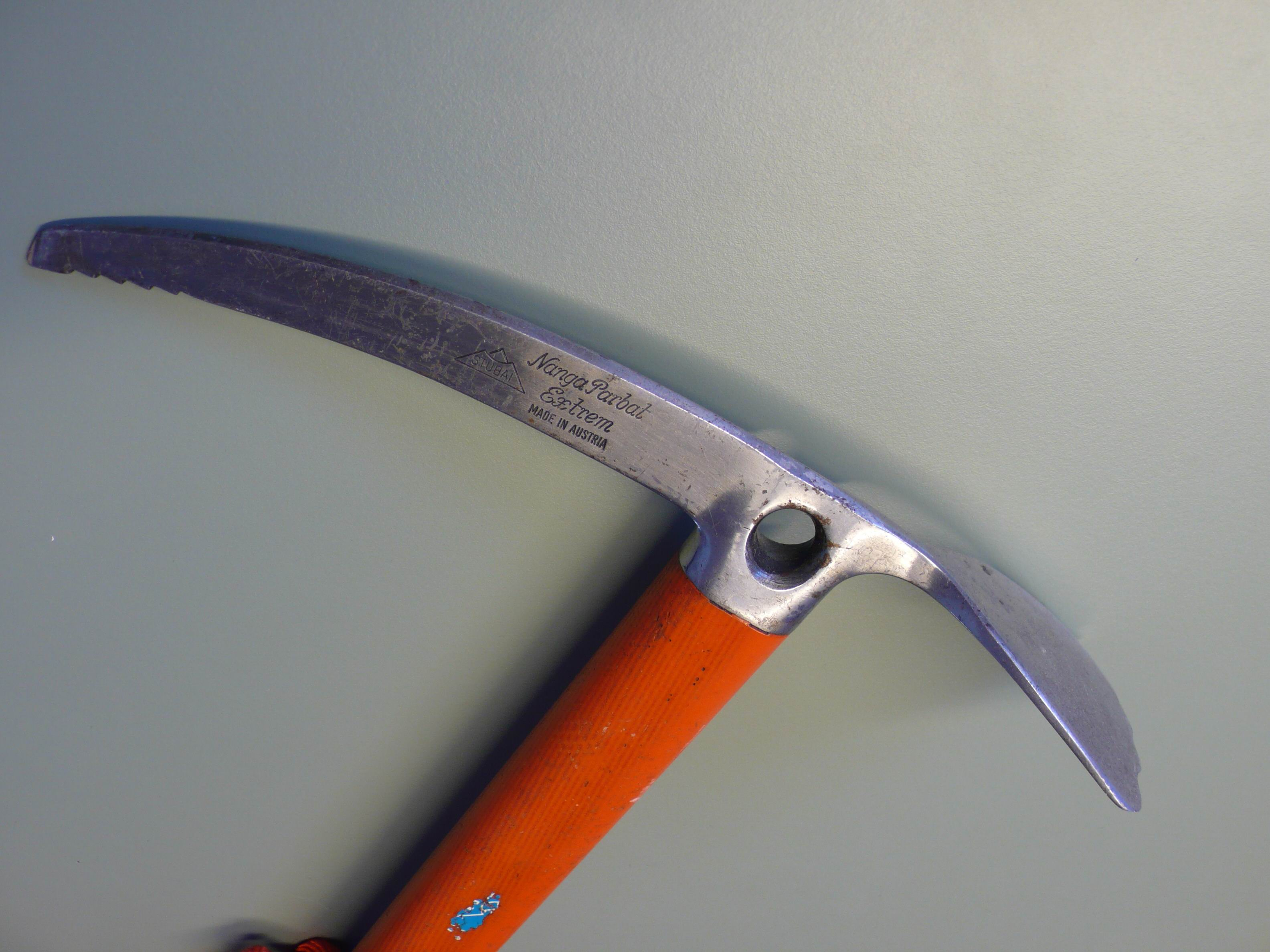 Historischer Eispickel mit GFK-Stiel